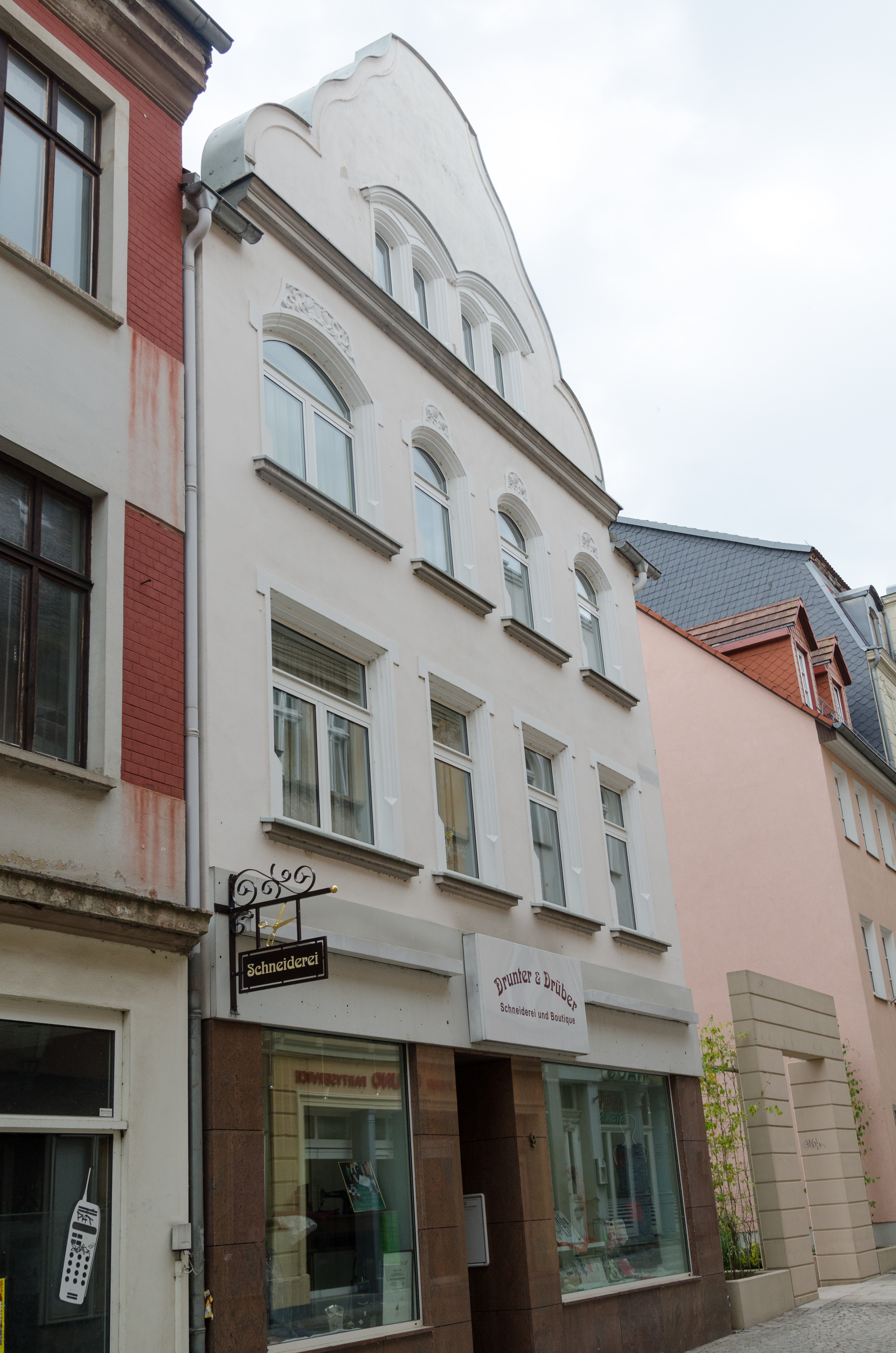 Zeitz, Kramerstraße 9